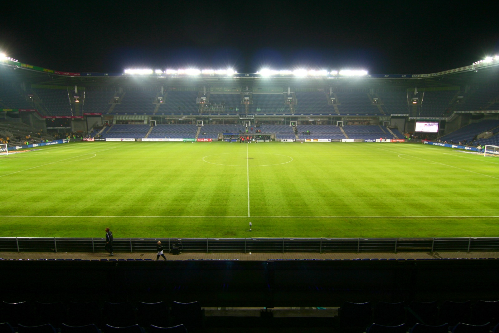 Brøndby Stadion after a game against FC Midtjylland